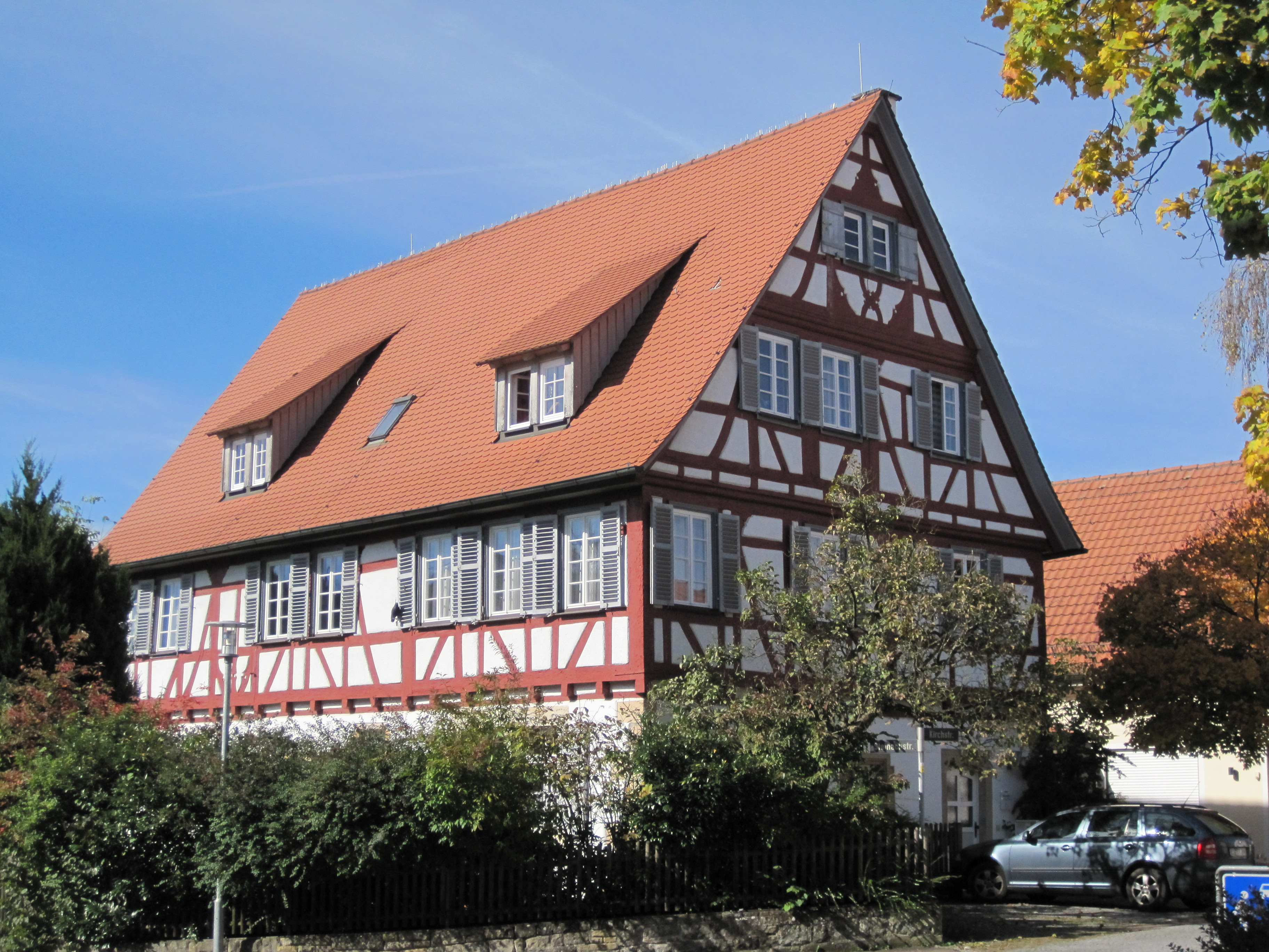 Pfarrhaus in Linsenhofen, Ortsteil von Frickenhausen.